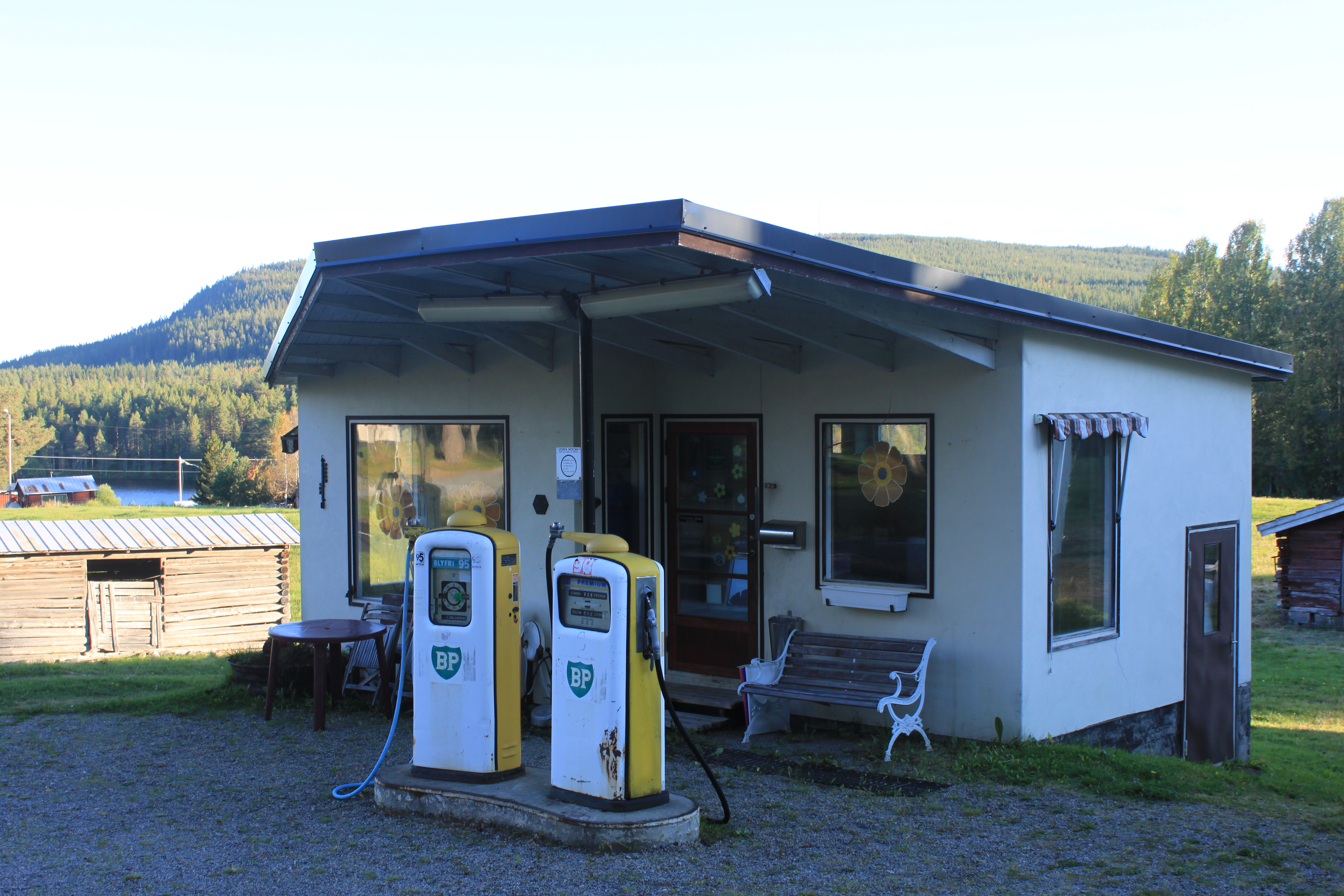 Den K-märkta bensinstationen i Skålan.